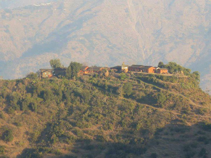 नेपाली: Bogata Kot Dadeldhuraa